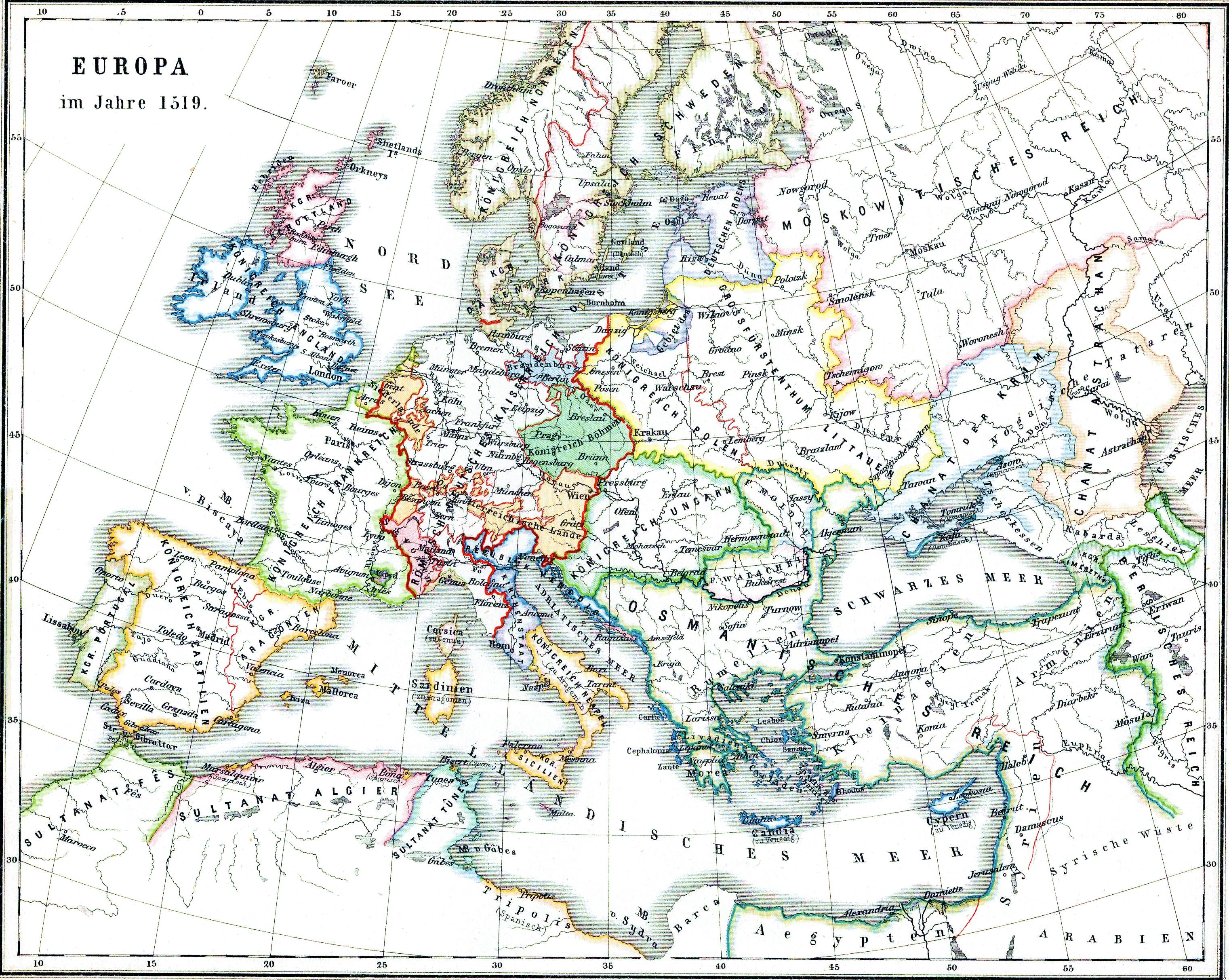 Europa im Jahre 1519